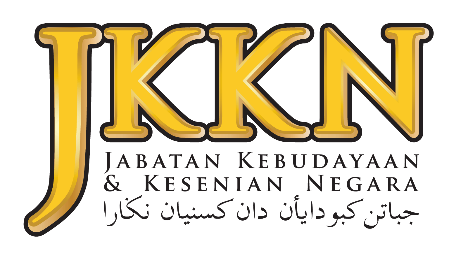 logo JKKN